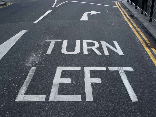 TURN LEFT